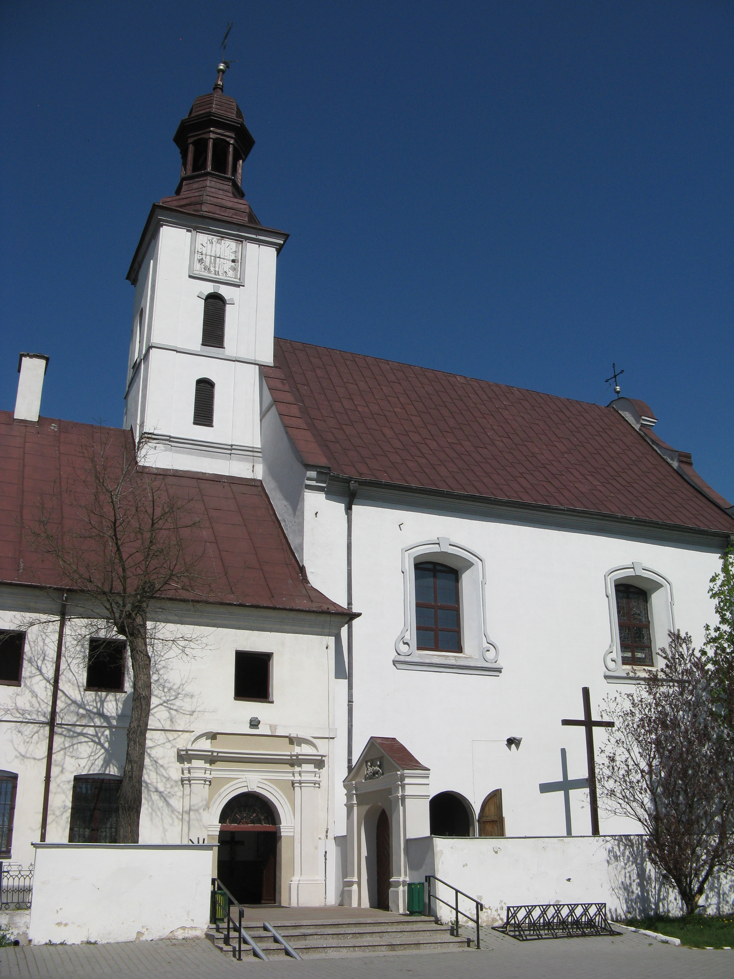 kościół p.w. św. Anny w Trutowie, Gmina Kikół